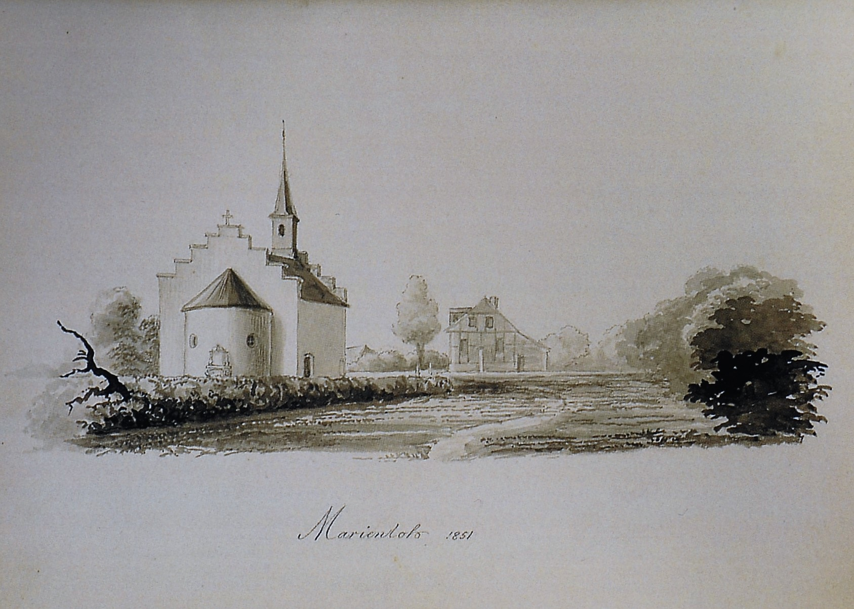 Kapelle in Marienloh, Baujahr 1848